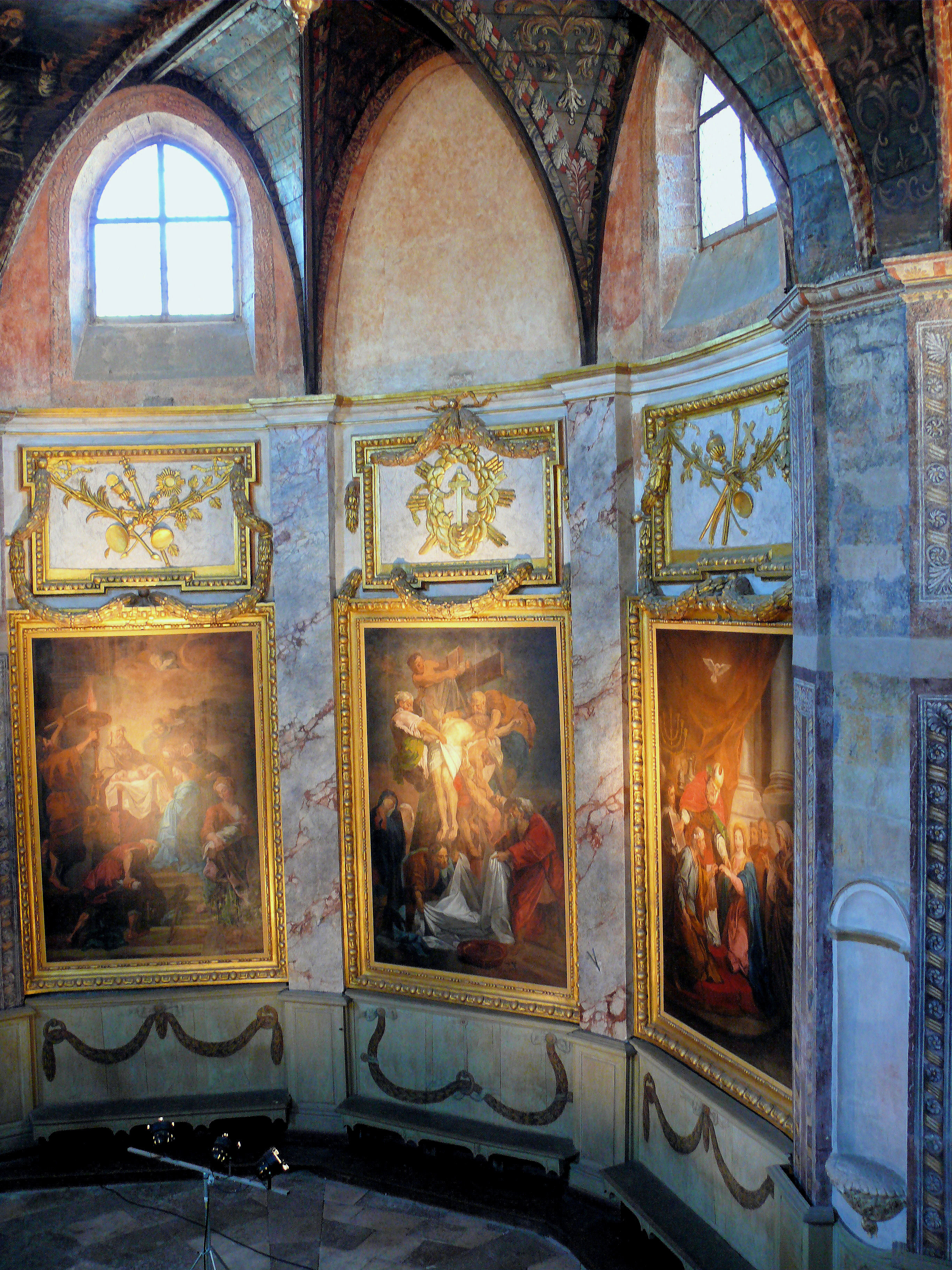 Villefranche-de-Rouergue - Chapelle des Pénitents-Noirs - Tableaux côté Nord